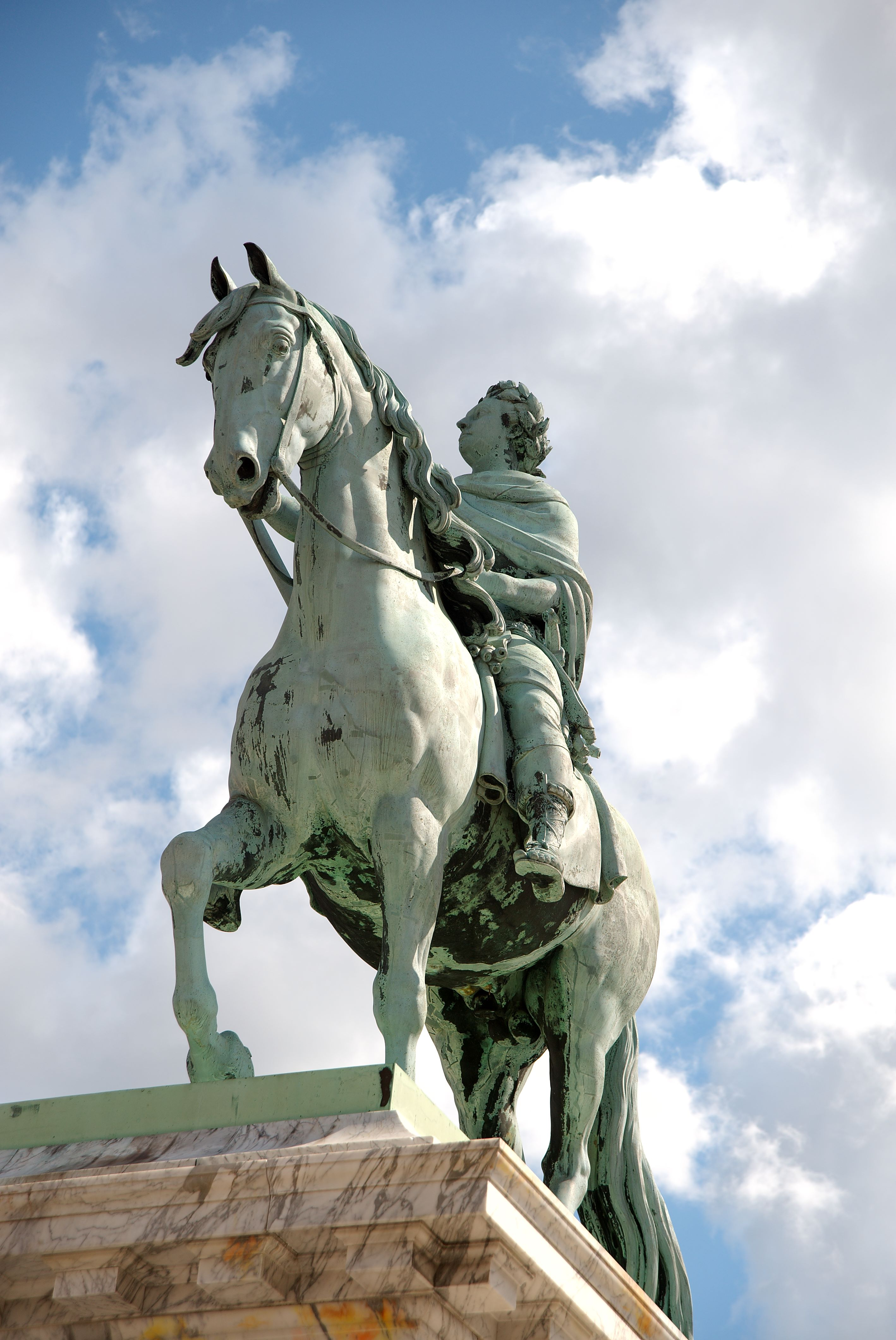 Salys Frederik V statue at Amalienborg Palace